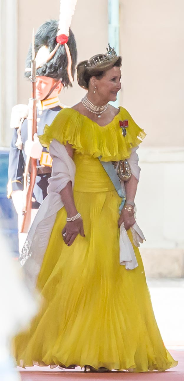 Queen Sonja of Norway in 2015.